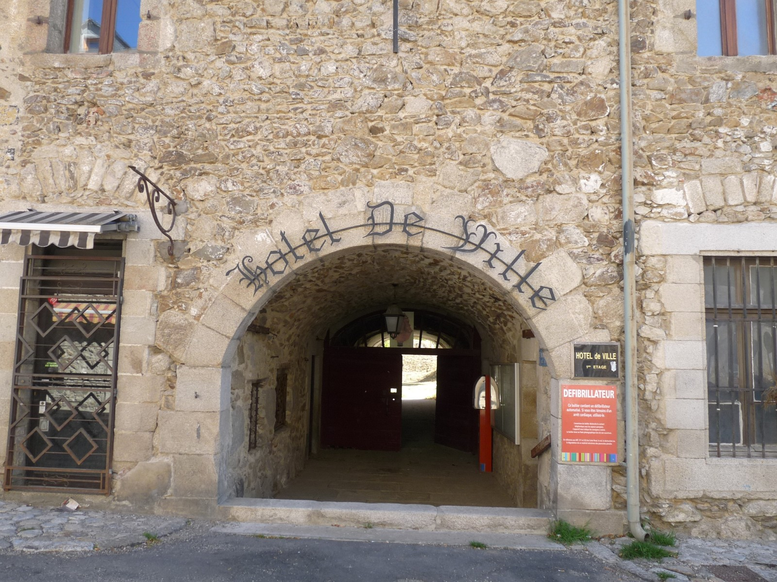 Mairie de Mont-Louis, Pyrénées-Orientales, France